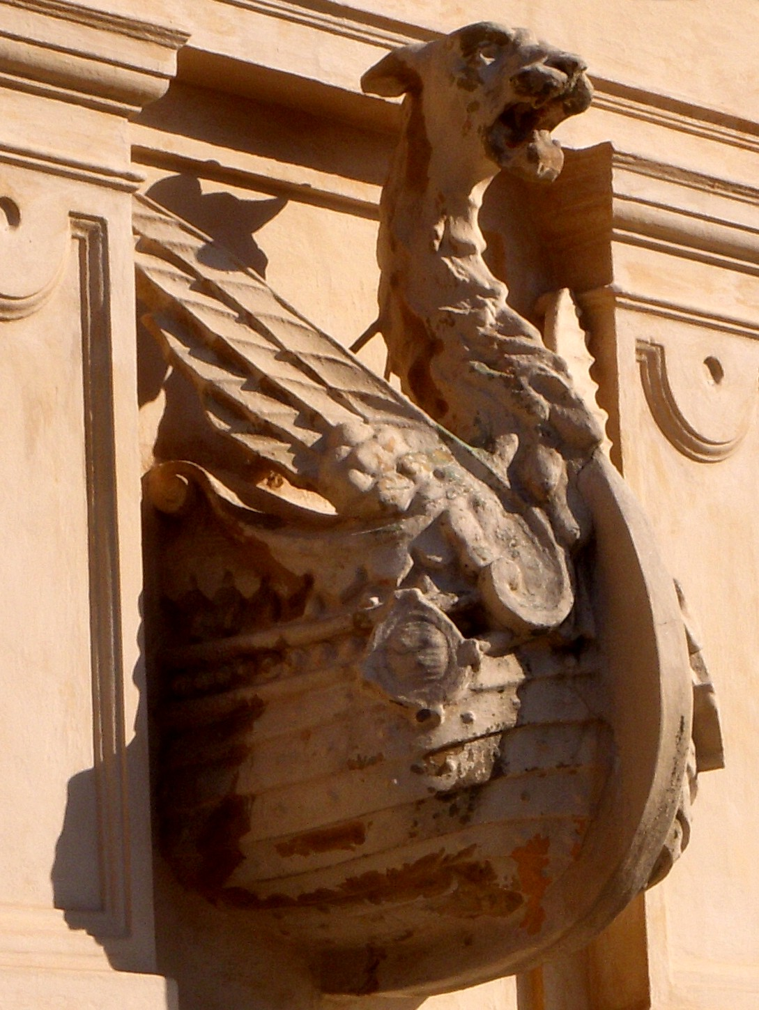 Fasaddetalj, Gamla Sjökrigsskolan på Skeppsholmen i Stockholm